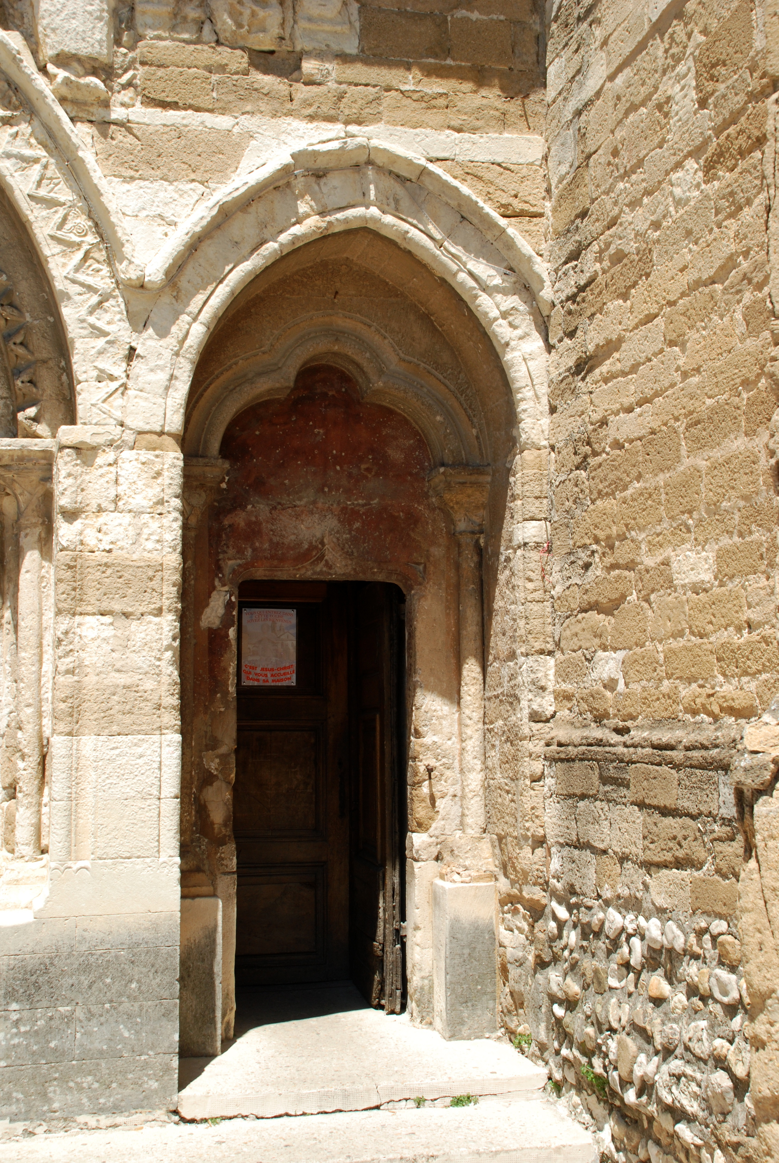 France - Provence - Église Notre-Dame-de-Nazareth de Valréas